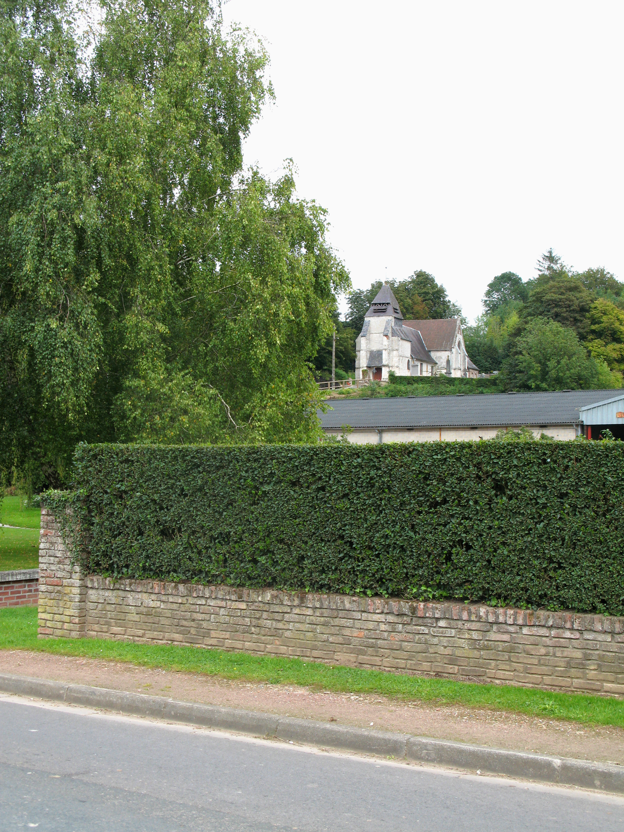 Fieffes-Montrelet (Somme, France) - L'église de Montrelet (vue de la rue principale qui longe la rivière).